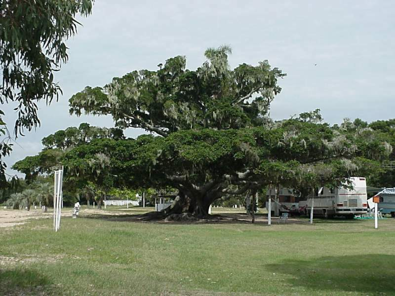 Figueira em Tapes - RS - Brasil